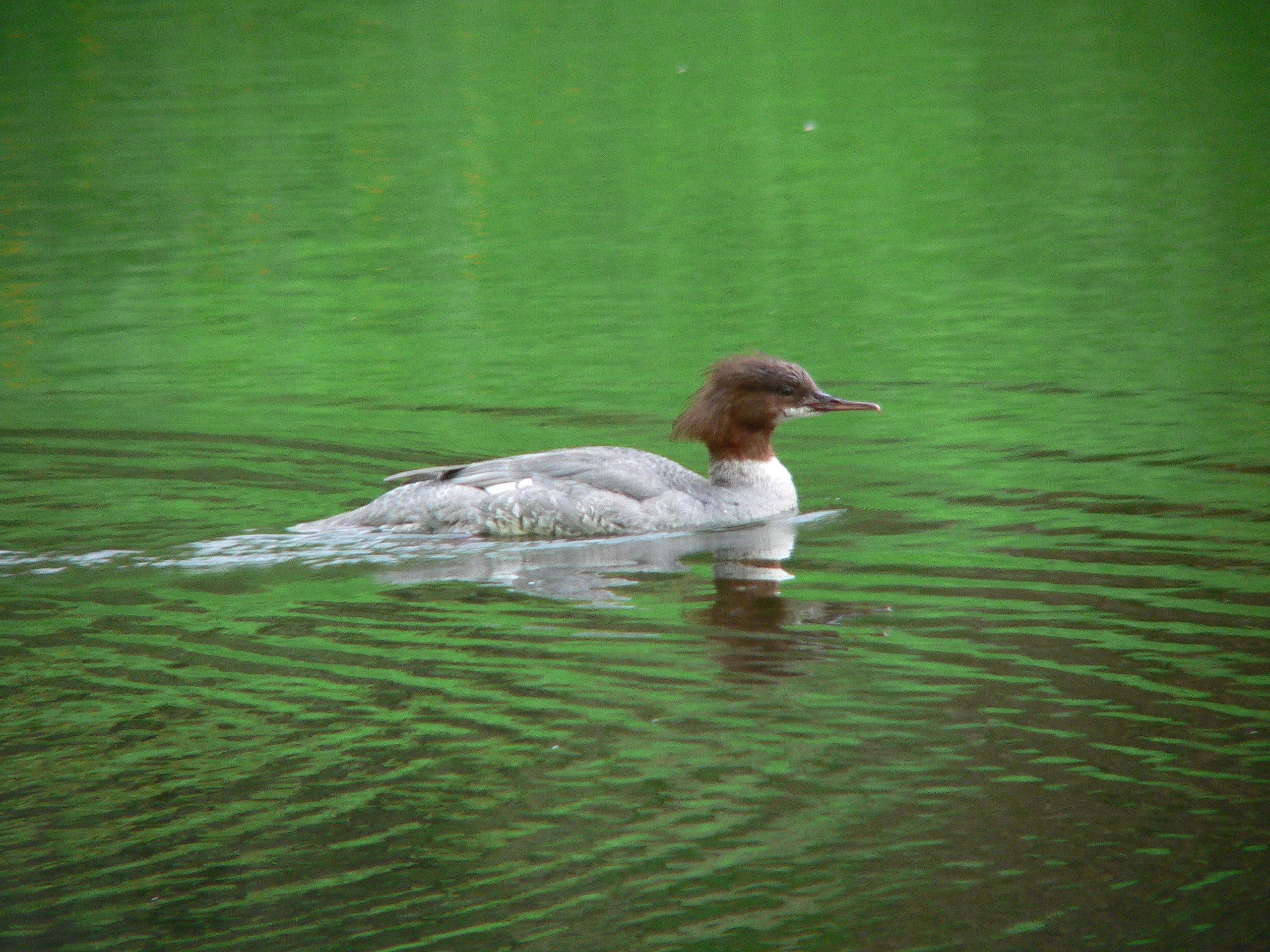 Common merganser - female (Mergus merganser), Warsaw, Poland